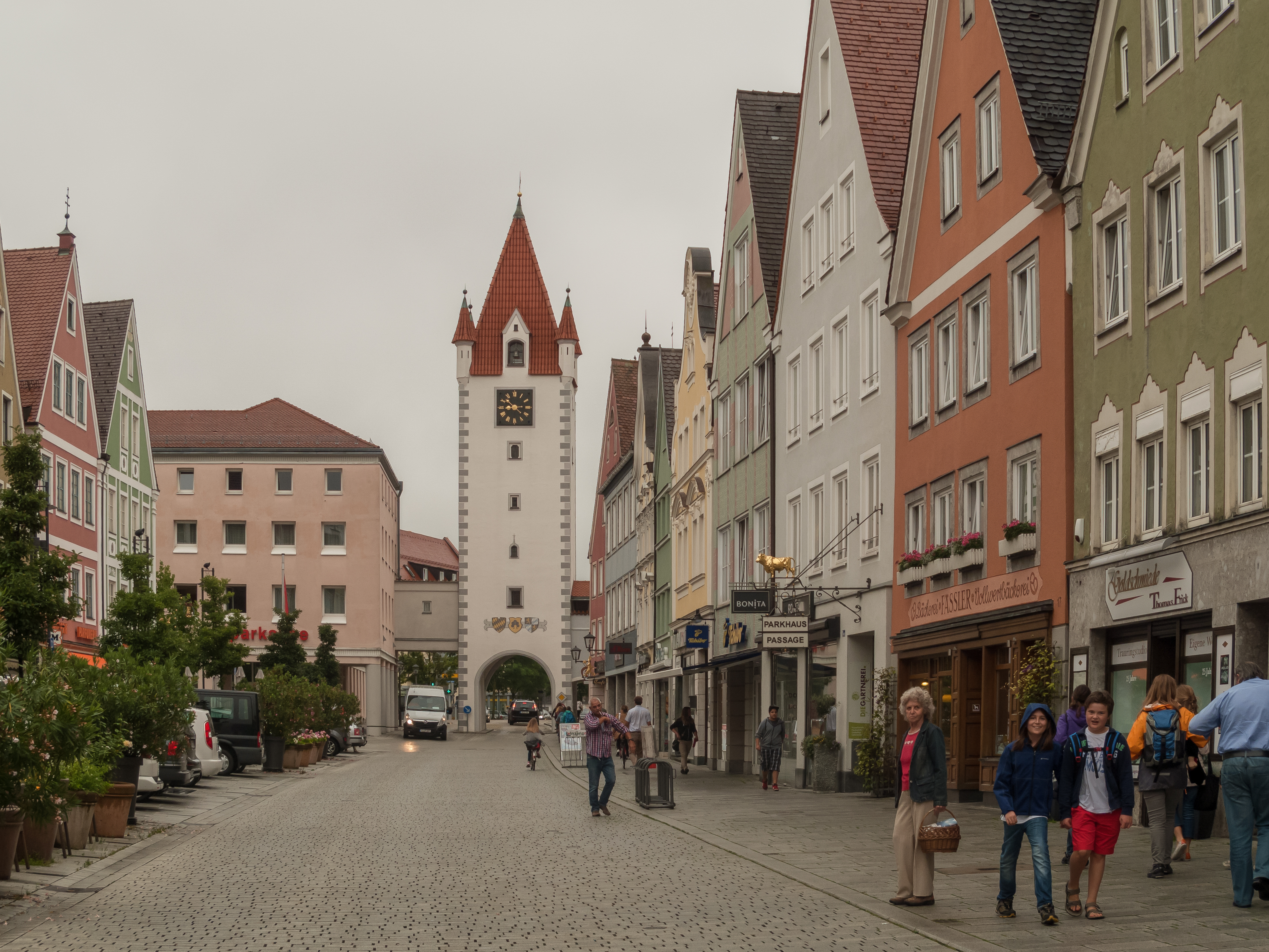 Mindelheim, Blick auf einer Strasse: die Maximilianstrasse mit dem Oberen Tor